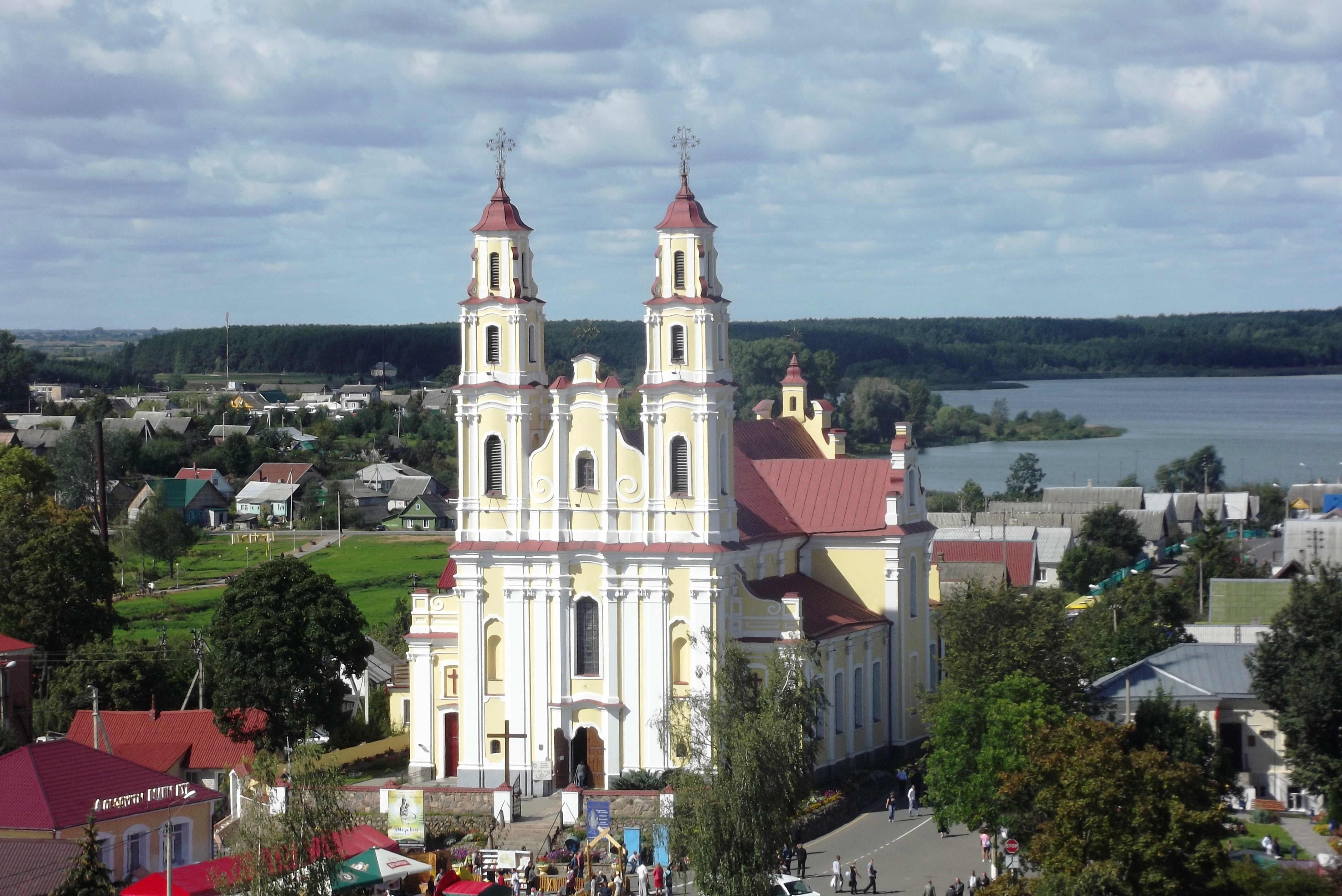 Беларуская (тарашкевіца): Троіцкі касьцёл. г. Глыбокае